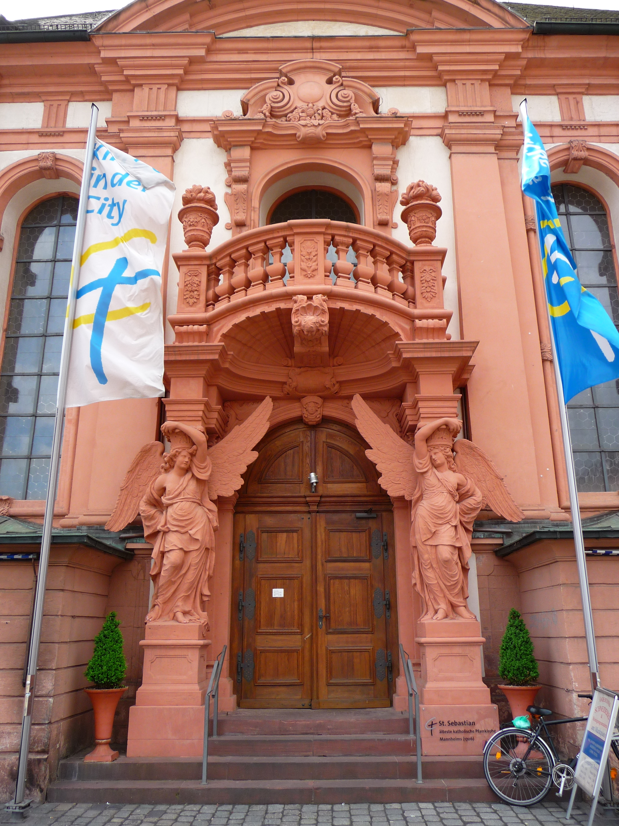 Blick auf Seitenportal der katholischen Kirche St. Sebastian in Mannheim (Baden-Württemberg, Deutschland)